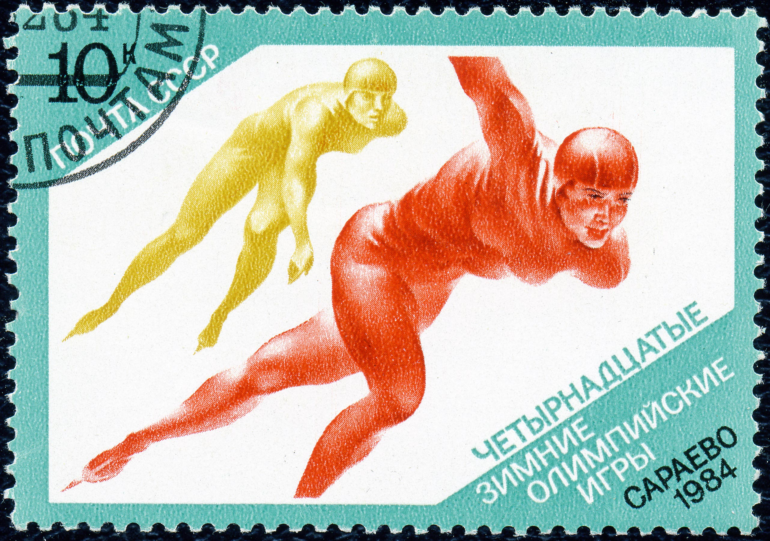 Почтовая марка СССР. 1984. XIV Зимние Олимпийские игры. Конькобежный спорт